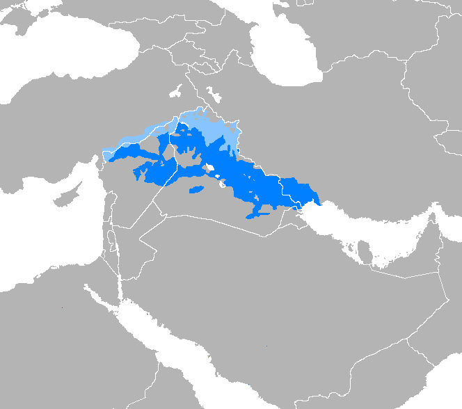 Árabe mesopotámico (Irakí) Hablantes mayoritarios Zonas donde otra lengua es mayoritaria (principalmente kurdo)